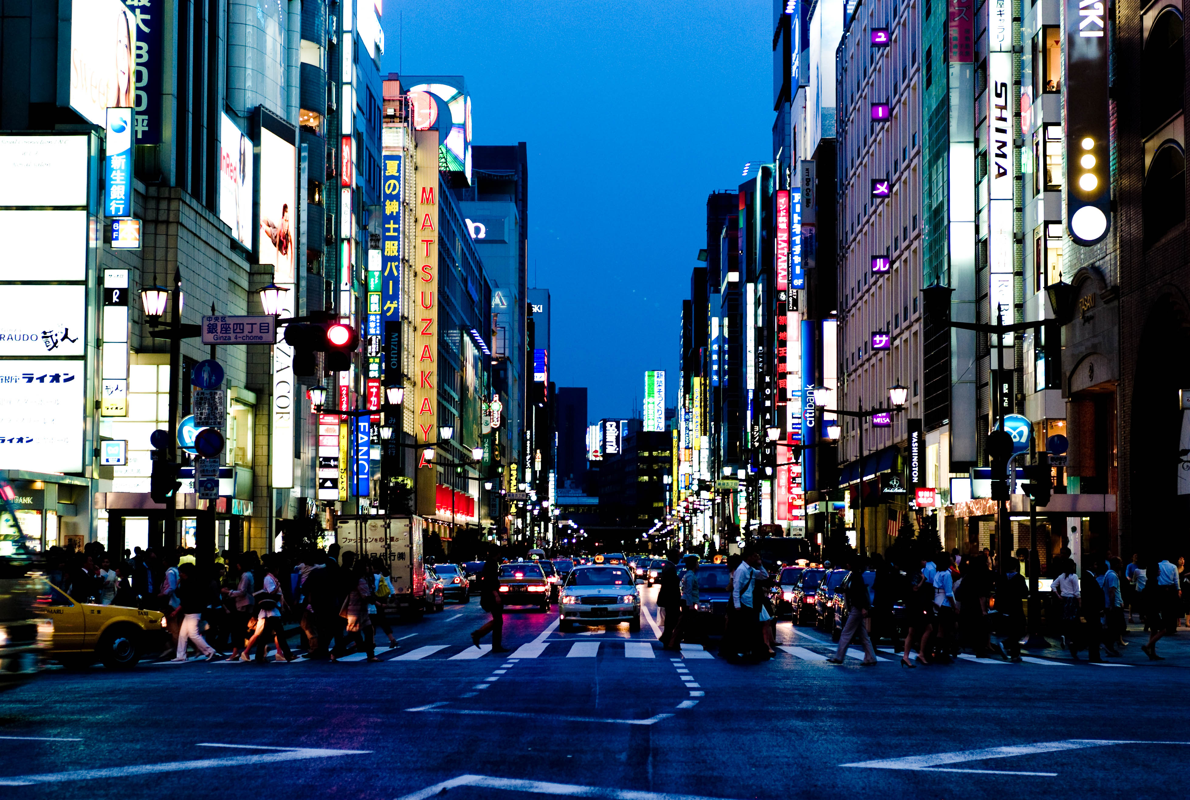 Ginza at dusk